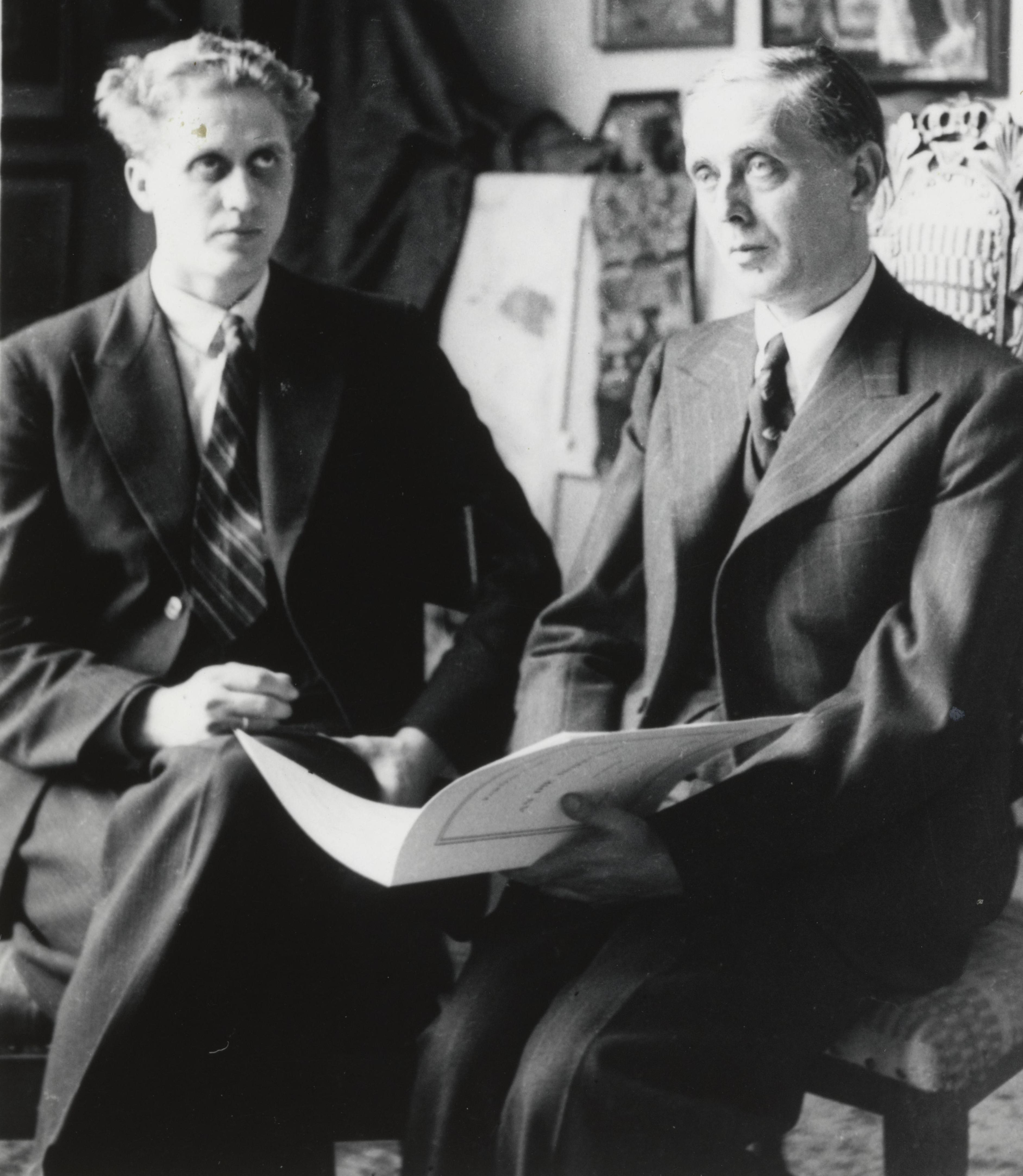 Bildet er hentet fra Nasjonalbibliotekets bildesamling Depicted person: Valen, Fartein